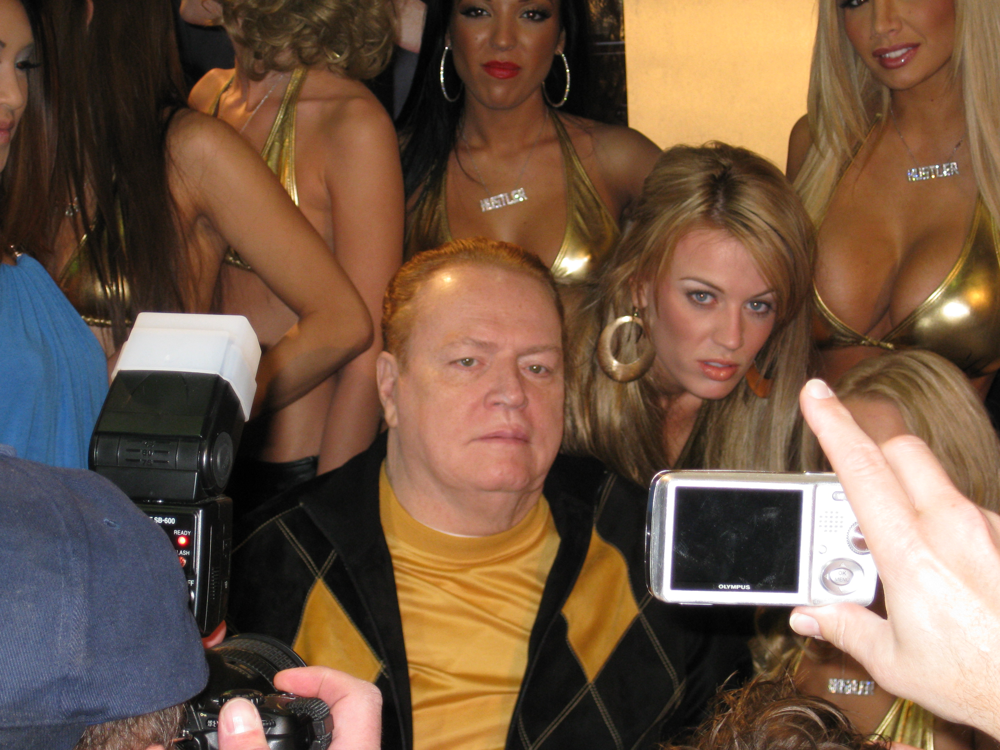 AEE2008_Day2 109